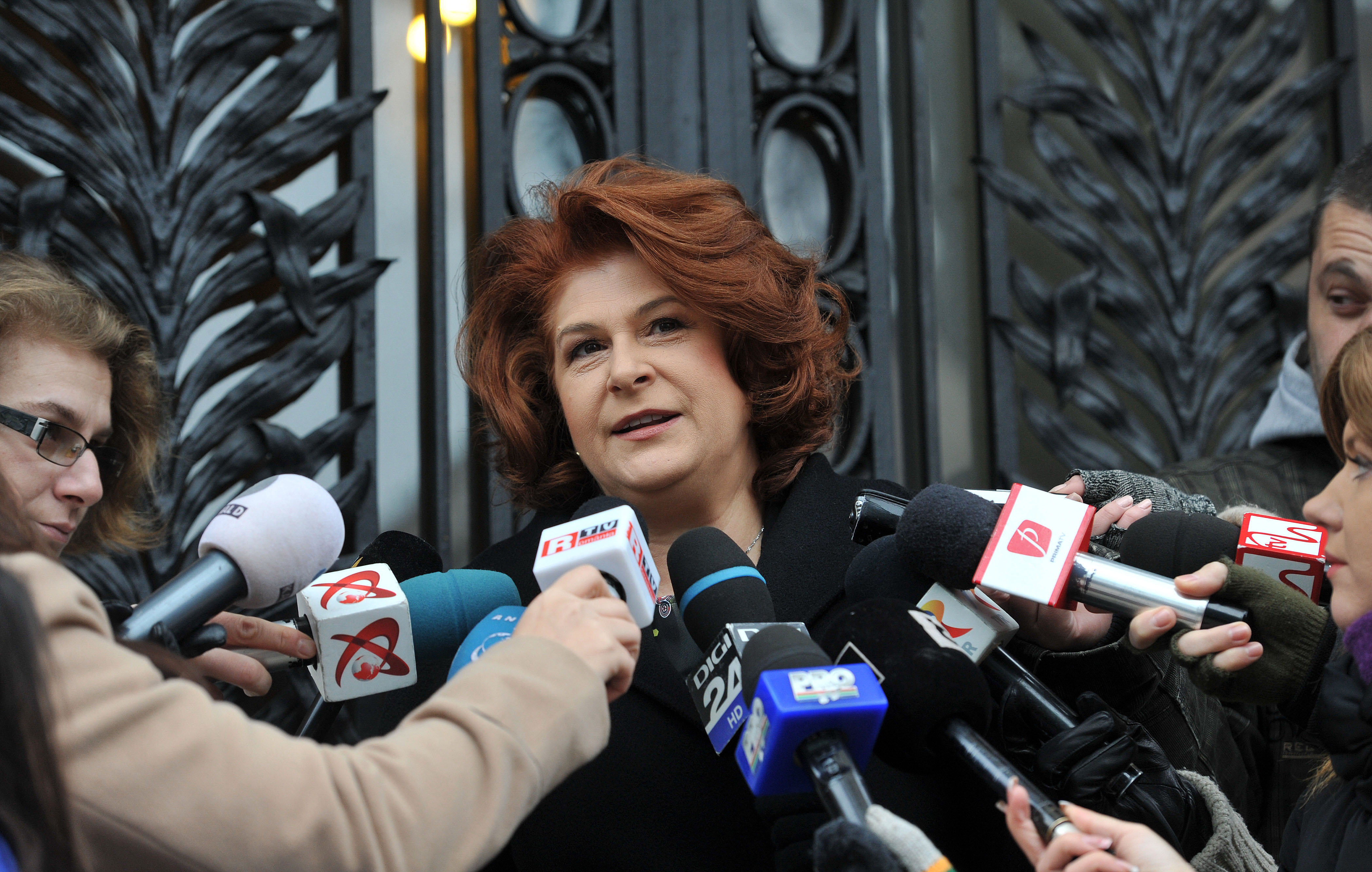 Rovana Plumb, reuniunea BPN a PSD - 06.01.2014